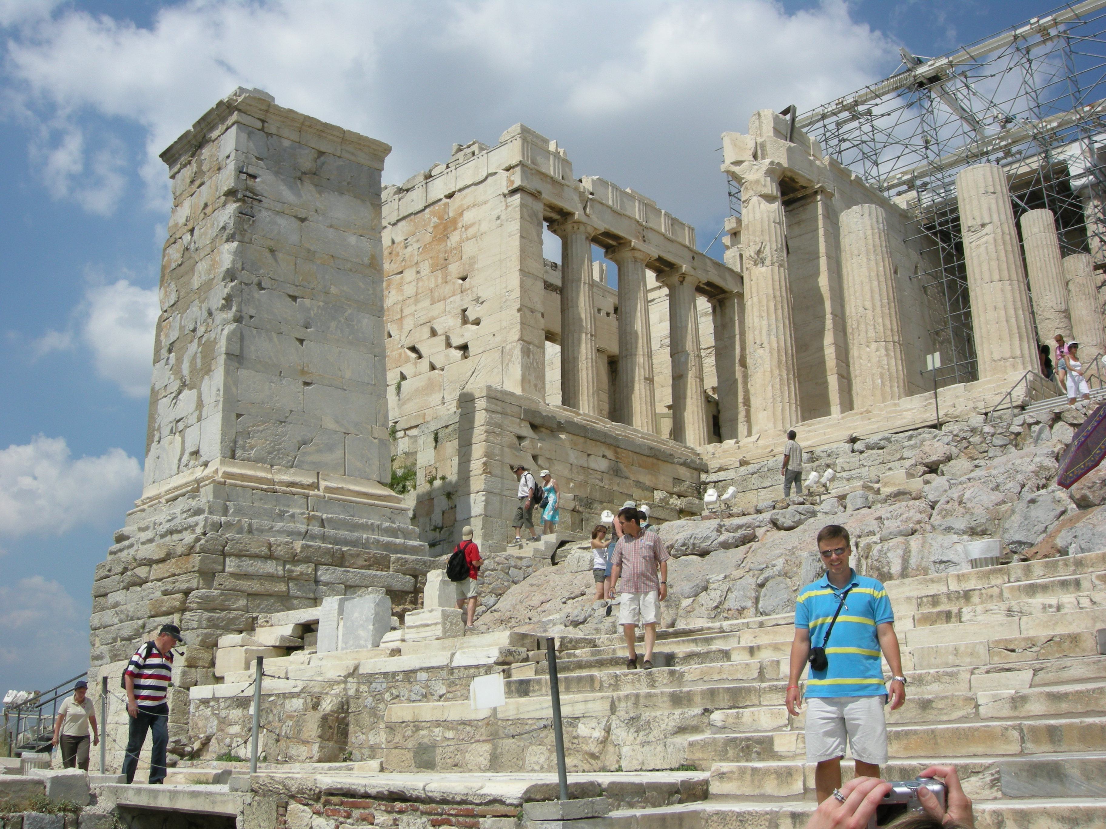 Propylaea